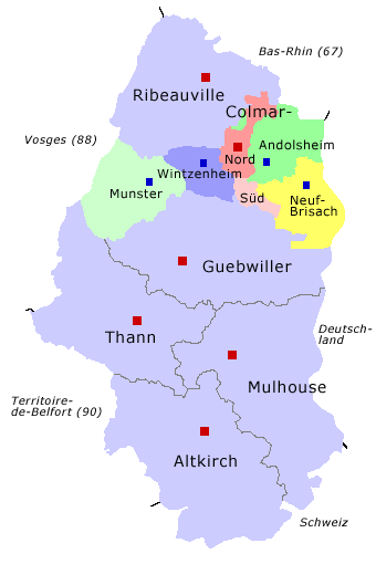 Arrondissement Colmar mit Verwaltungsgiederung und Lage im Département Haut-Rhin